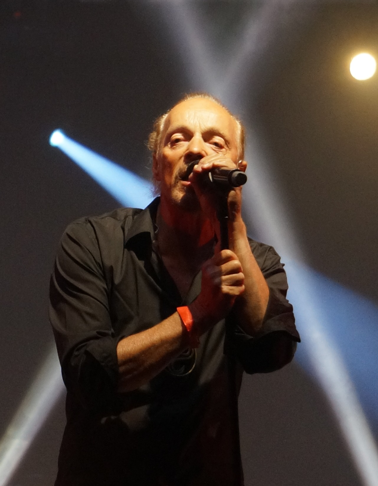 concert à Châlons.